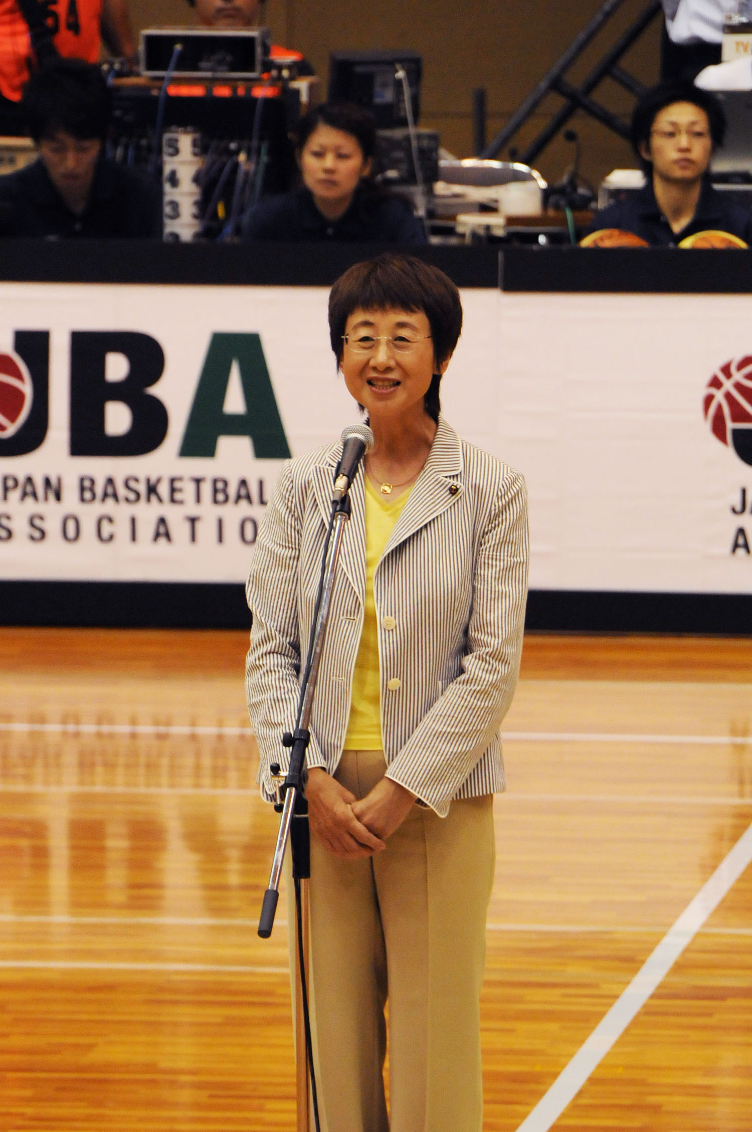 奥山恵美子仙台市長。青葉体育館で。